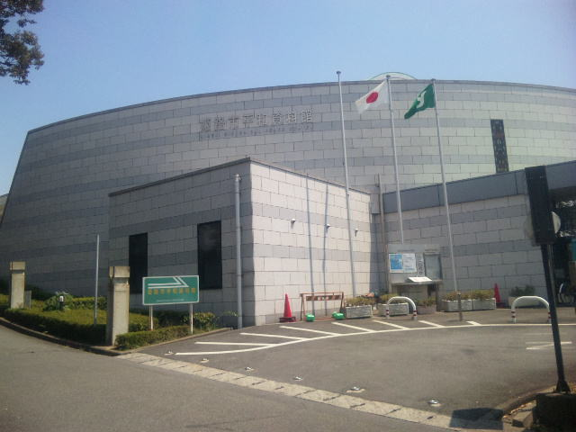 兵庫県姫路市にある姫路市平和資料館。